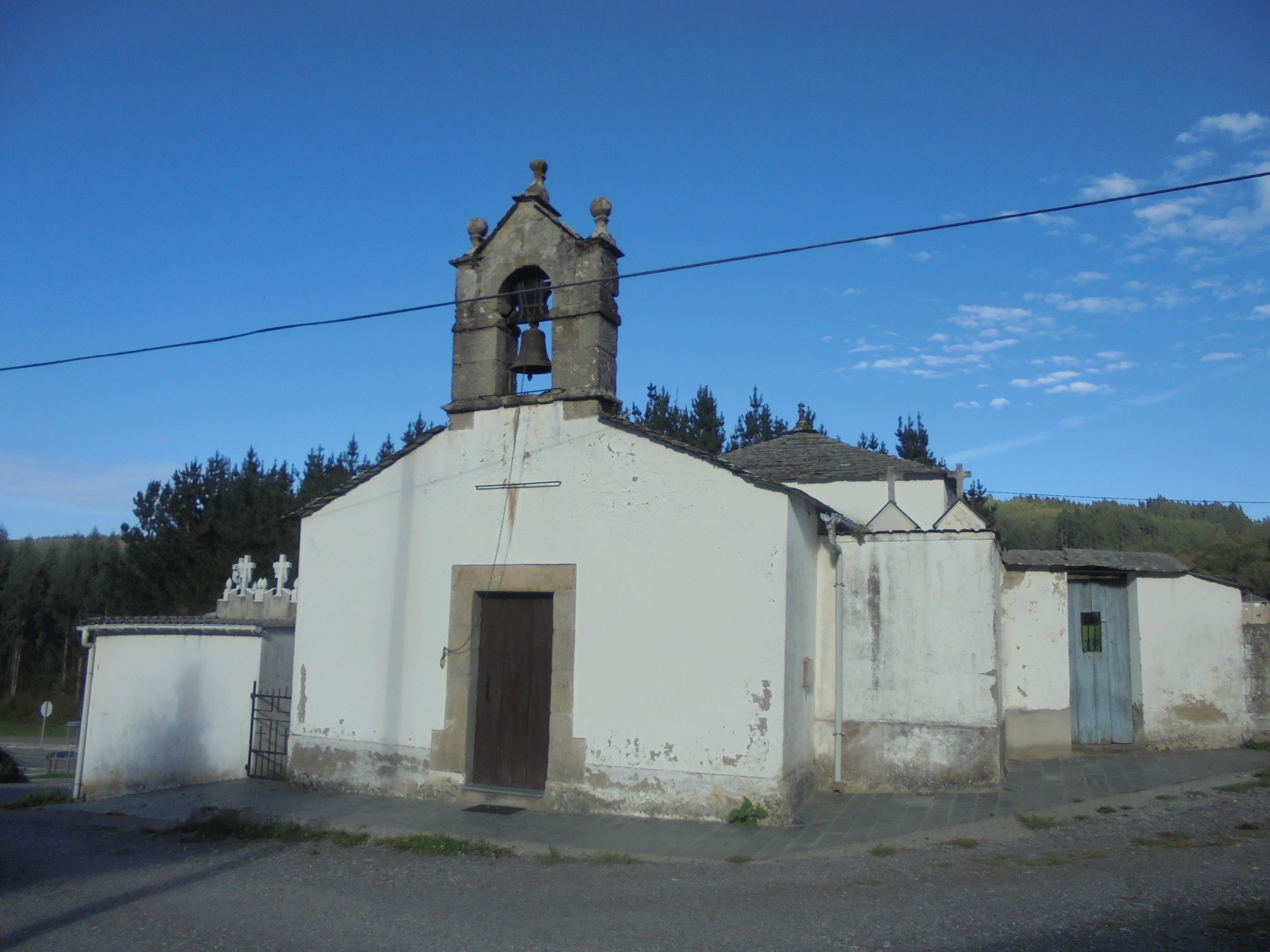 Igrexa parroquial de Milleirós ( Pol)